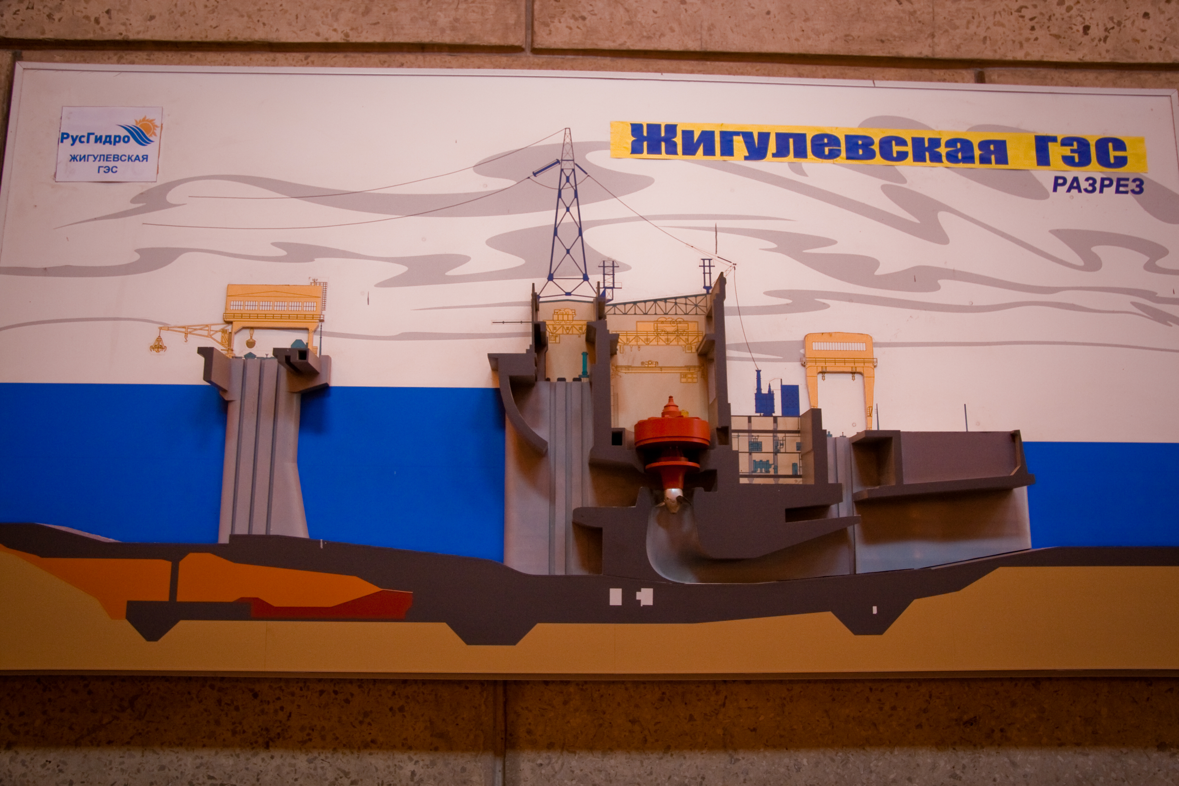 План станции в разрезе. Жигулёвская ГЭС. Жигулёвск-Тольятти. Россия